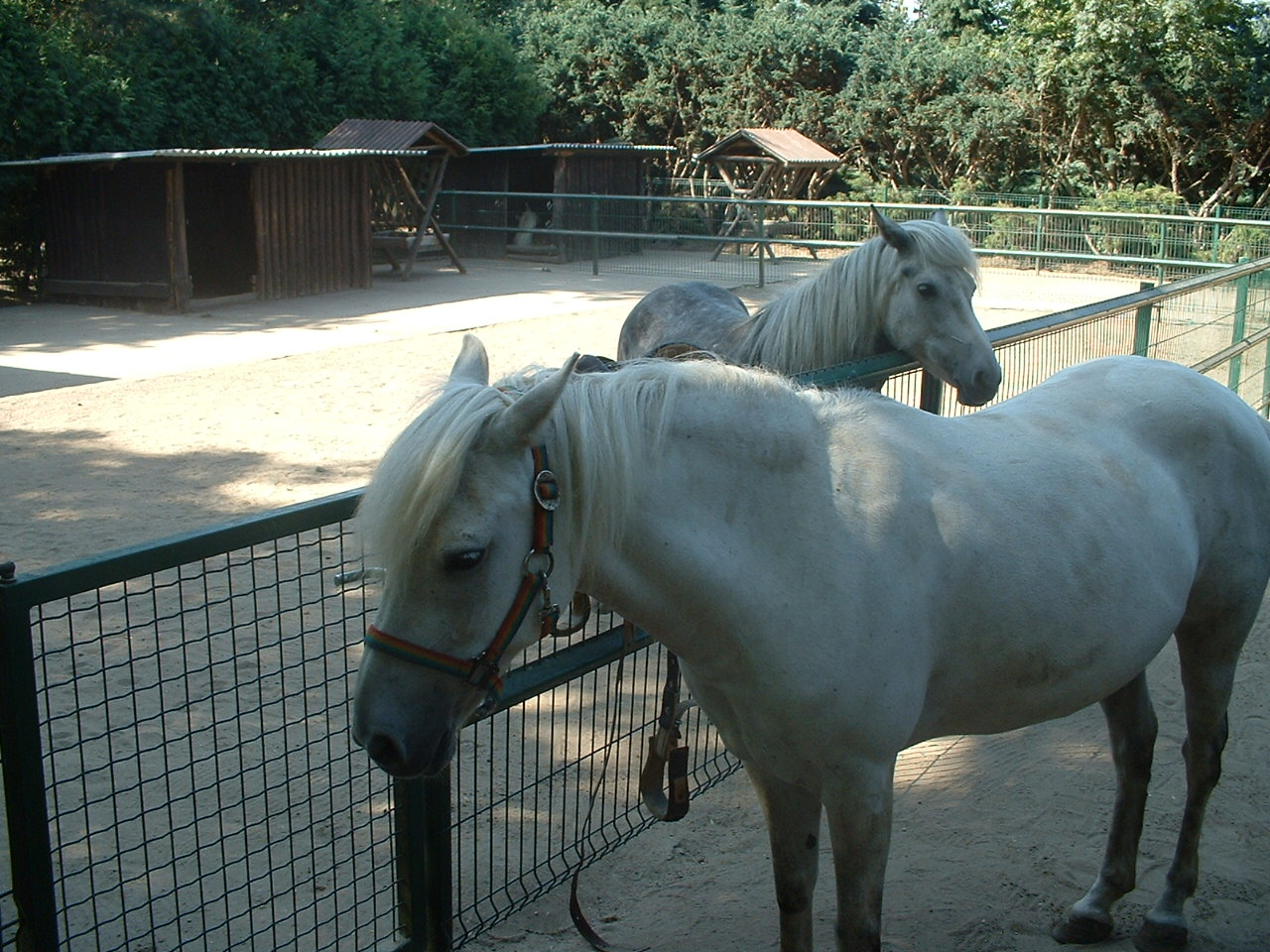 Gotlandpony02 im Oderbruchzoo Altreetz 2006